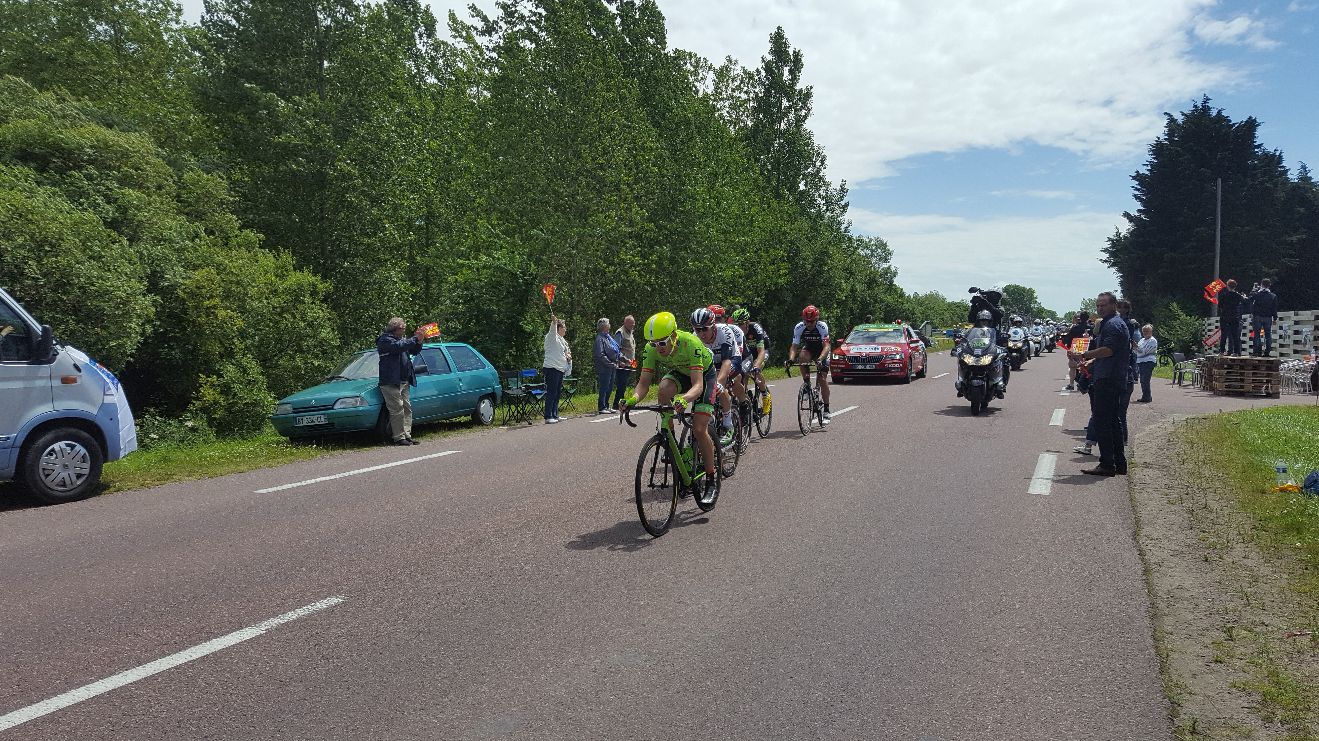 Passage de l'échappée à Gouville-sur-Mer durant la 1re étape du Tour de France 2016. Alex Howes mène la course, devant Leigh Howard, Paul Voss, Anthony Delaplace et Jan Bárta.